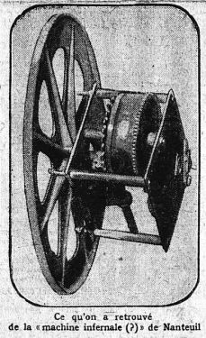 Photo de la "machine infernale" du tunnel de Nanteuil